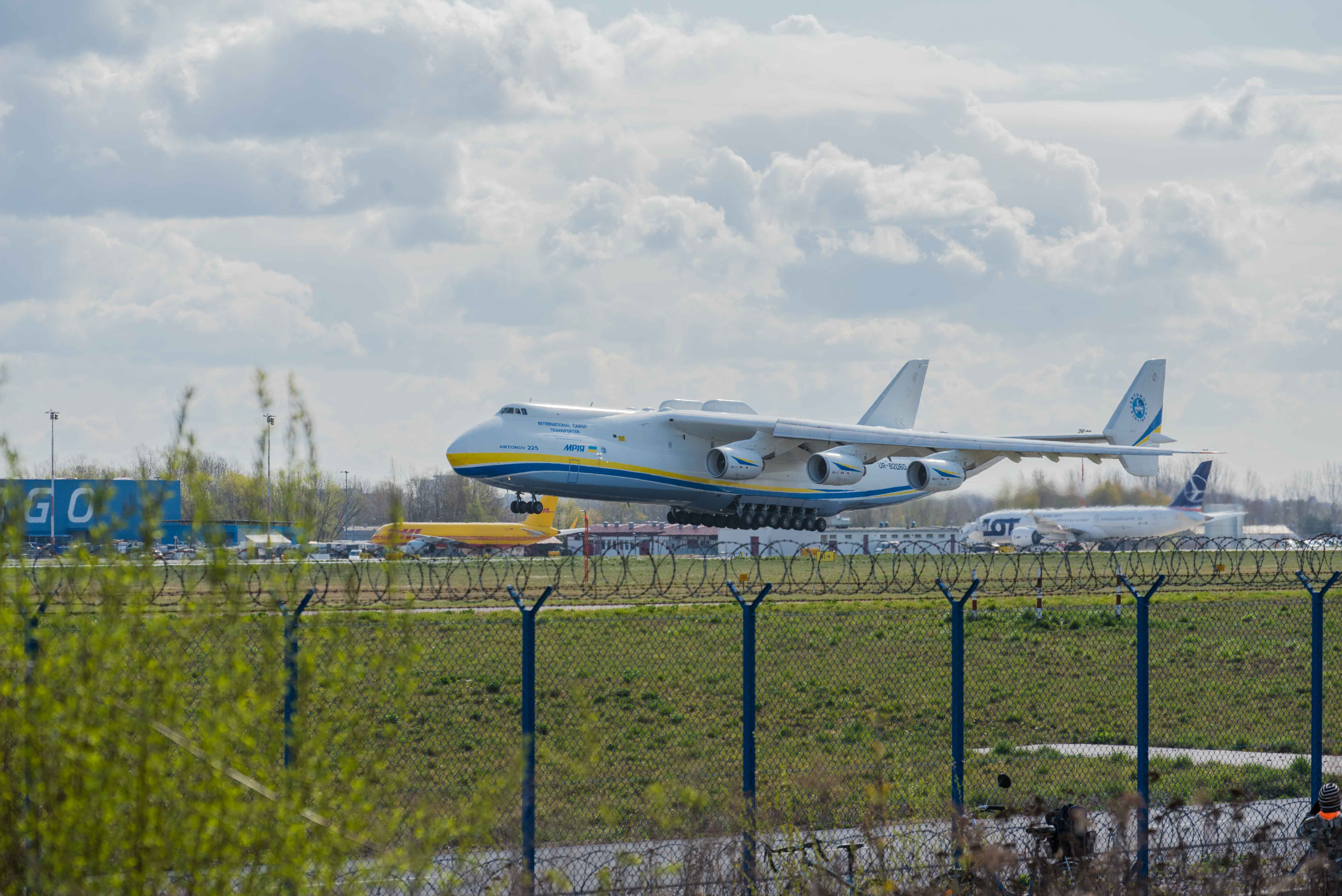 Landung der An-225 am Flughafen Chopin in Warschau, 14. April 2020